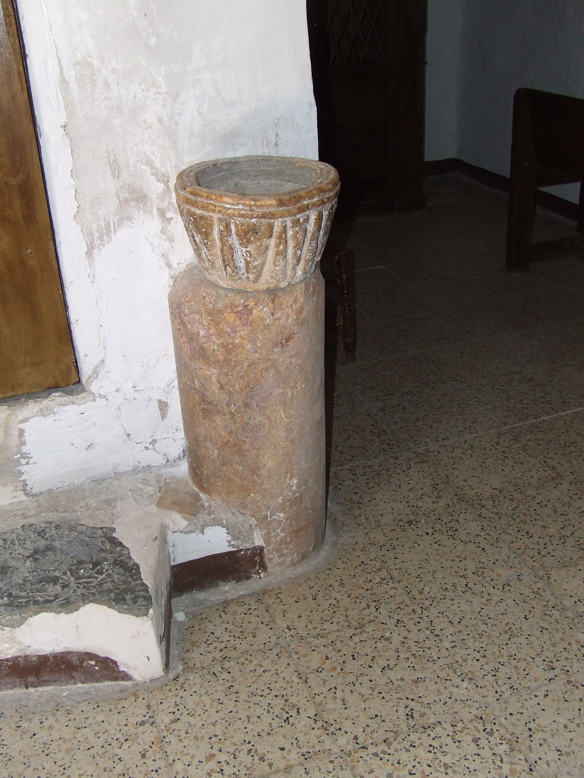 Pica d'aigua beneïda de Sant Joan de Vinyafrescal (la Pobla de Segur, Pallars Jussà)